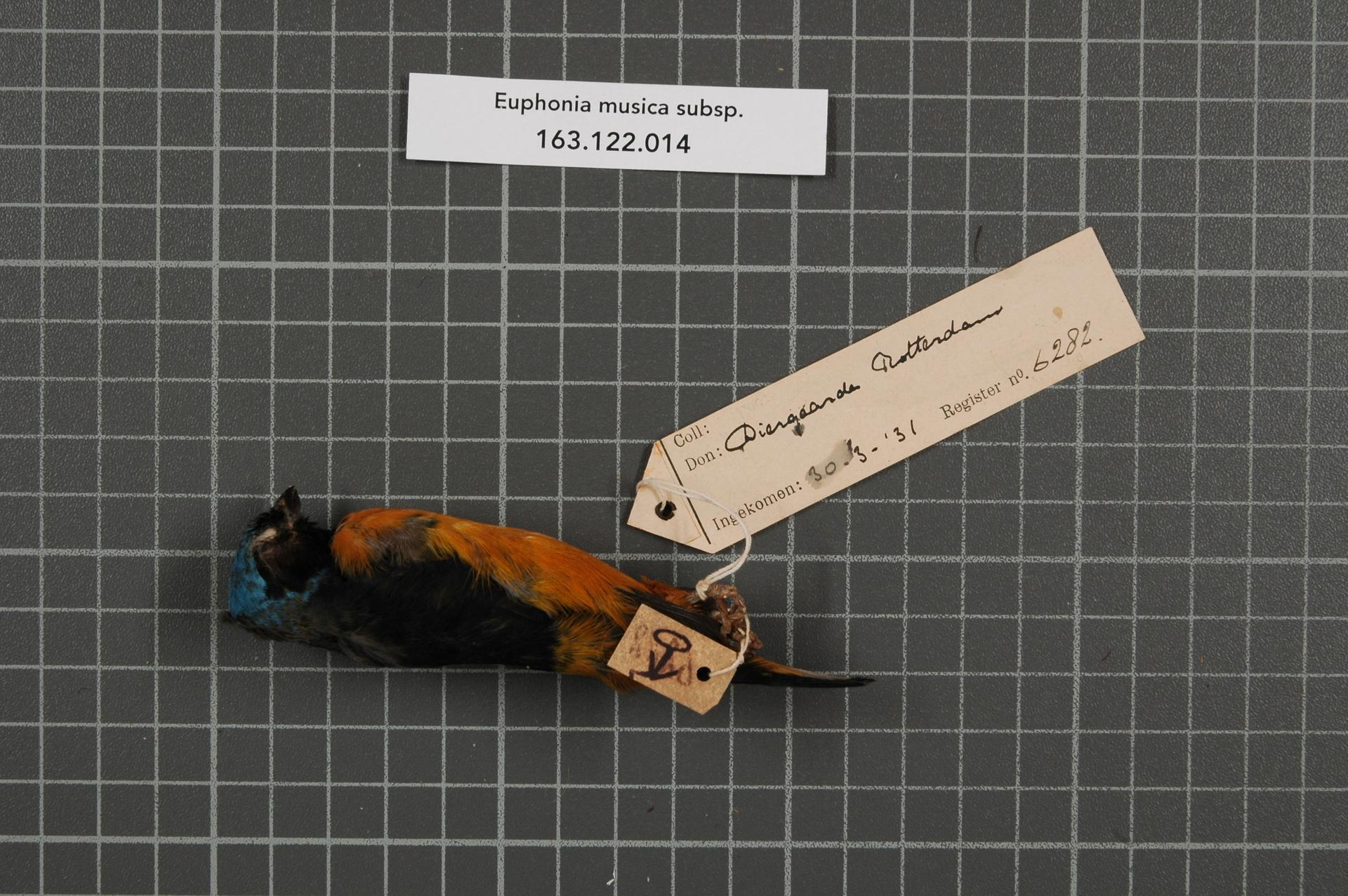 Euphonia musica subsp.